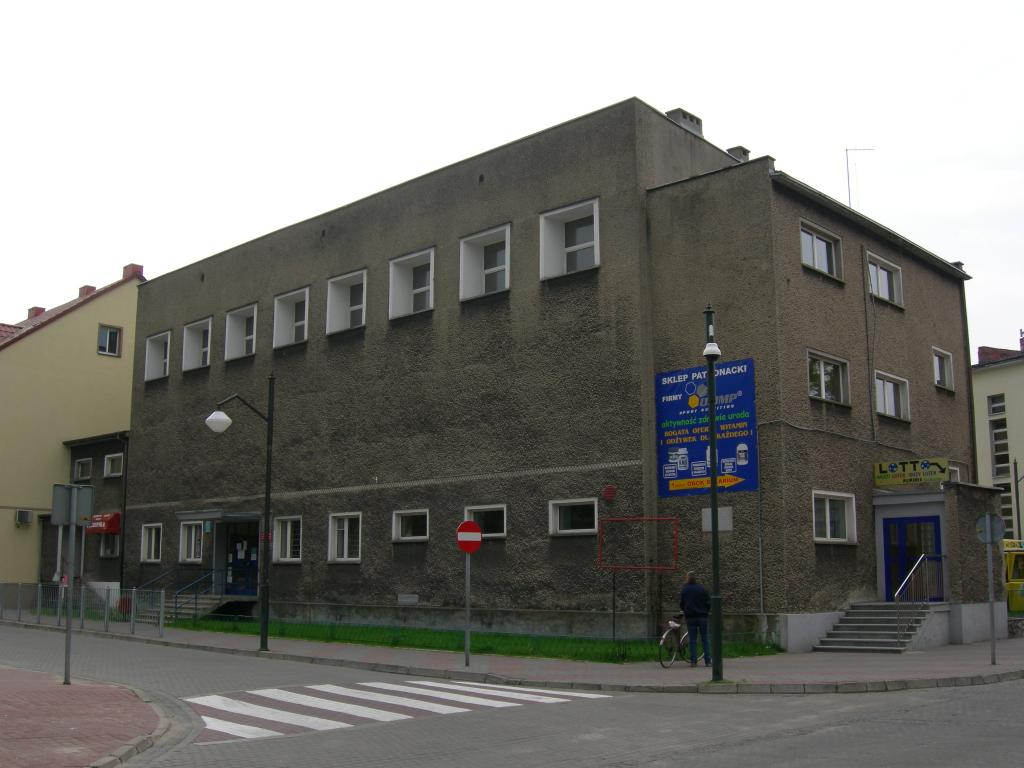 Synagoga w Strzelcach Opolskich/Synagogue de Strzelce Opolskie